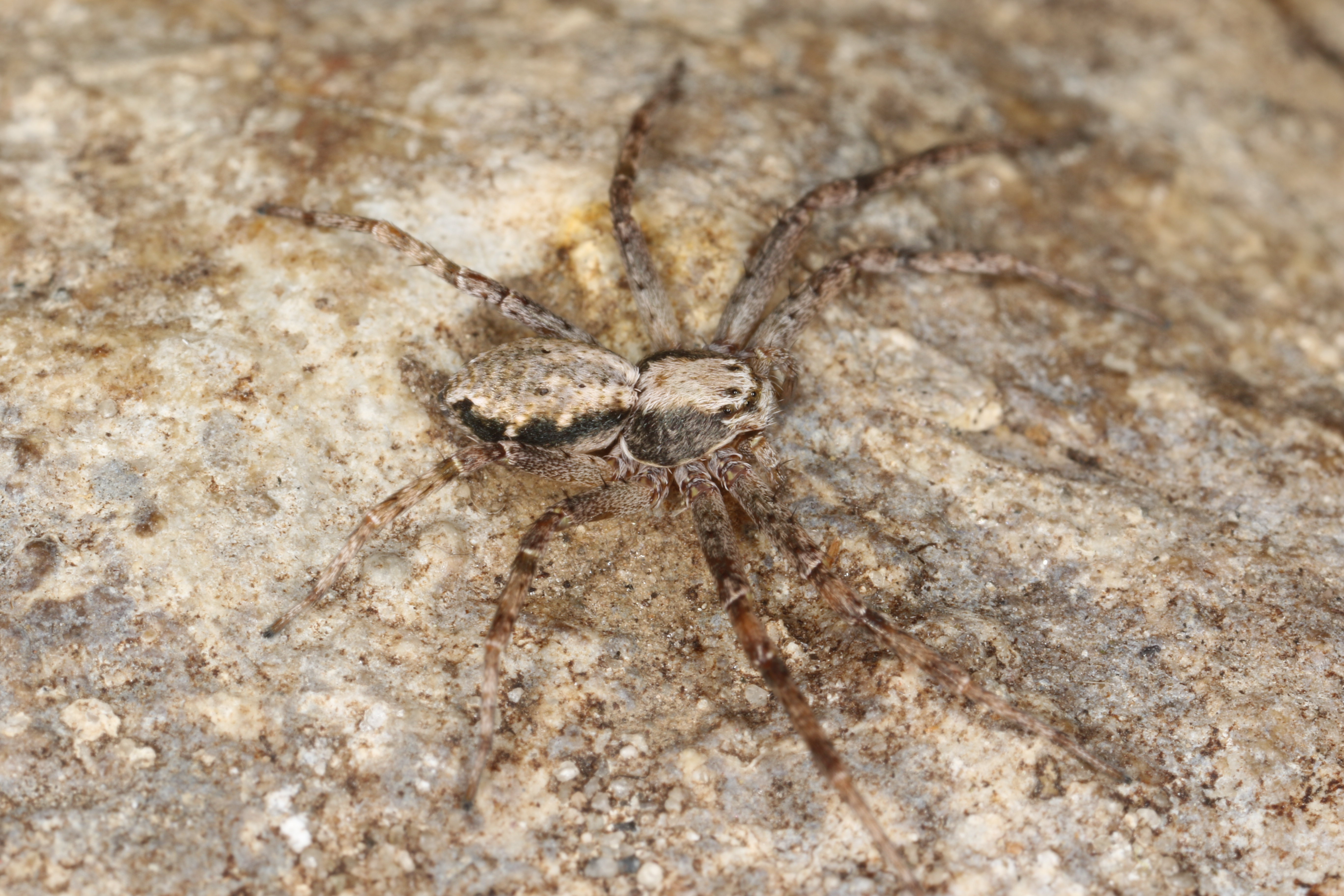 Philodromus aureolus (Clerck, 1757), female, Søborg, Denmark, 2 June 2016